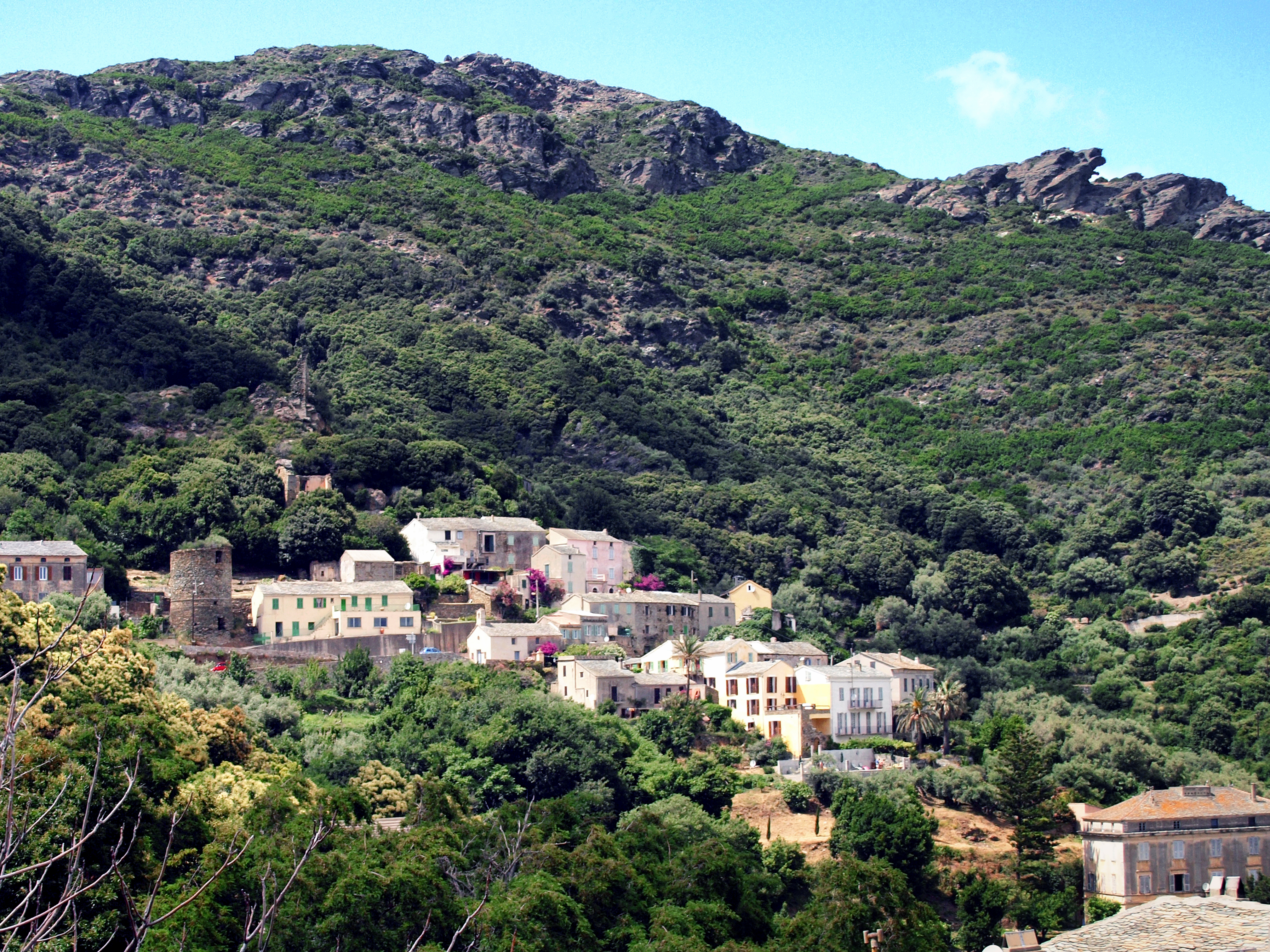 Rogliano, Cap Corse - Quercioli, hameau avec sa tour génoise ronde, la petite chapelle Saint-Roch, etc. Object location42° 57′ 27.4″ N, 9° 24′ 57.83″ E